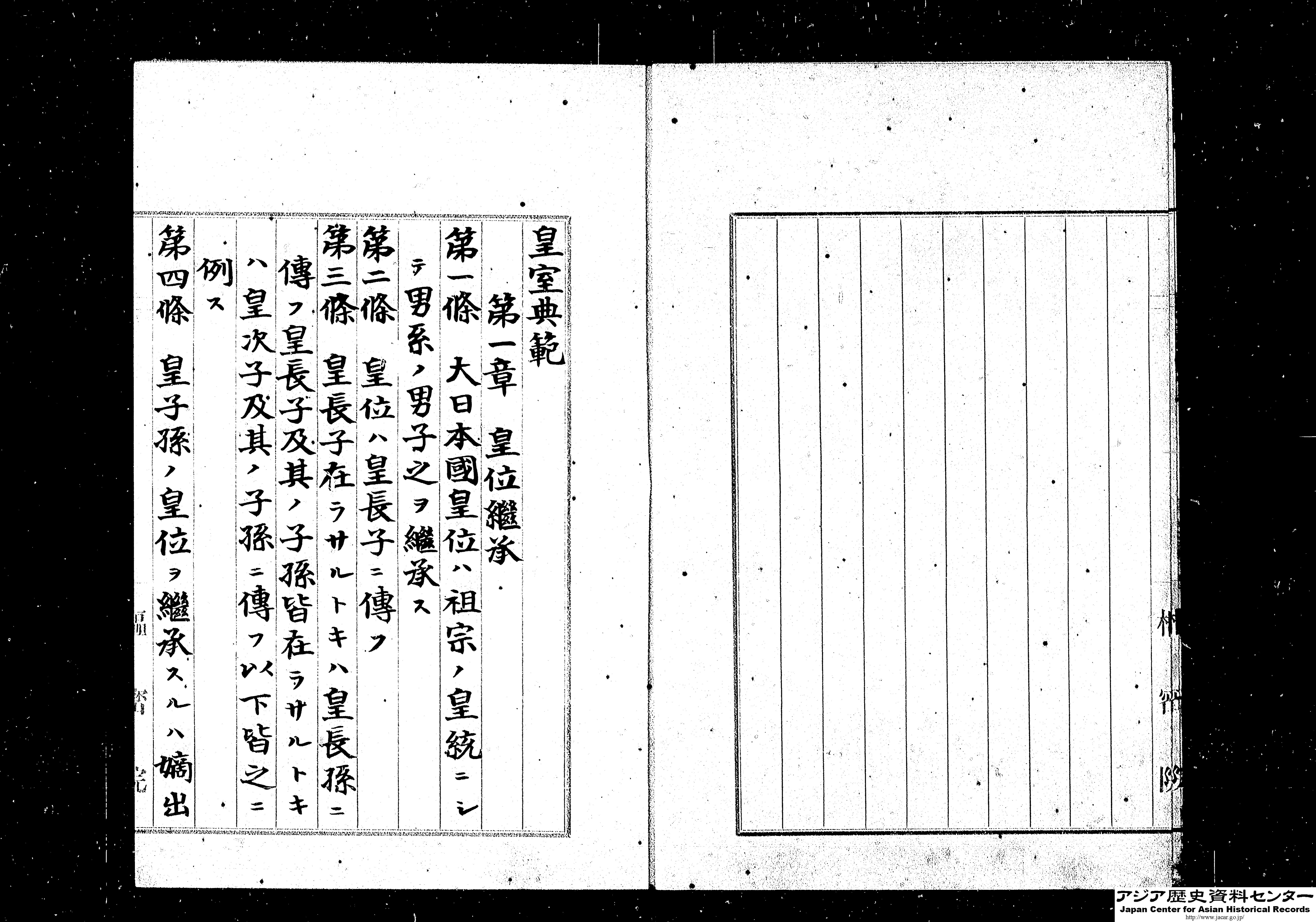 皇室典範・御署名原本・明治二十二年・皇室典範二月十一日（旧皇室典範）